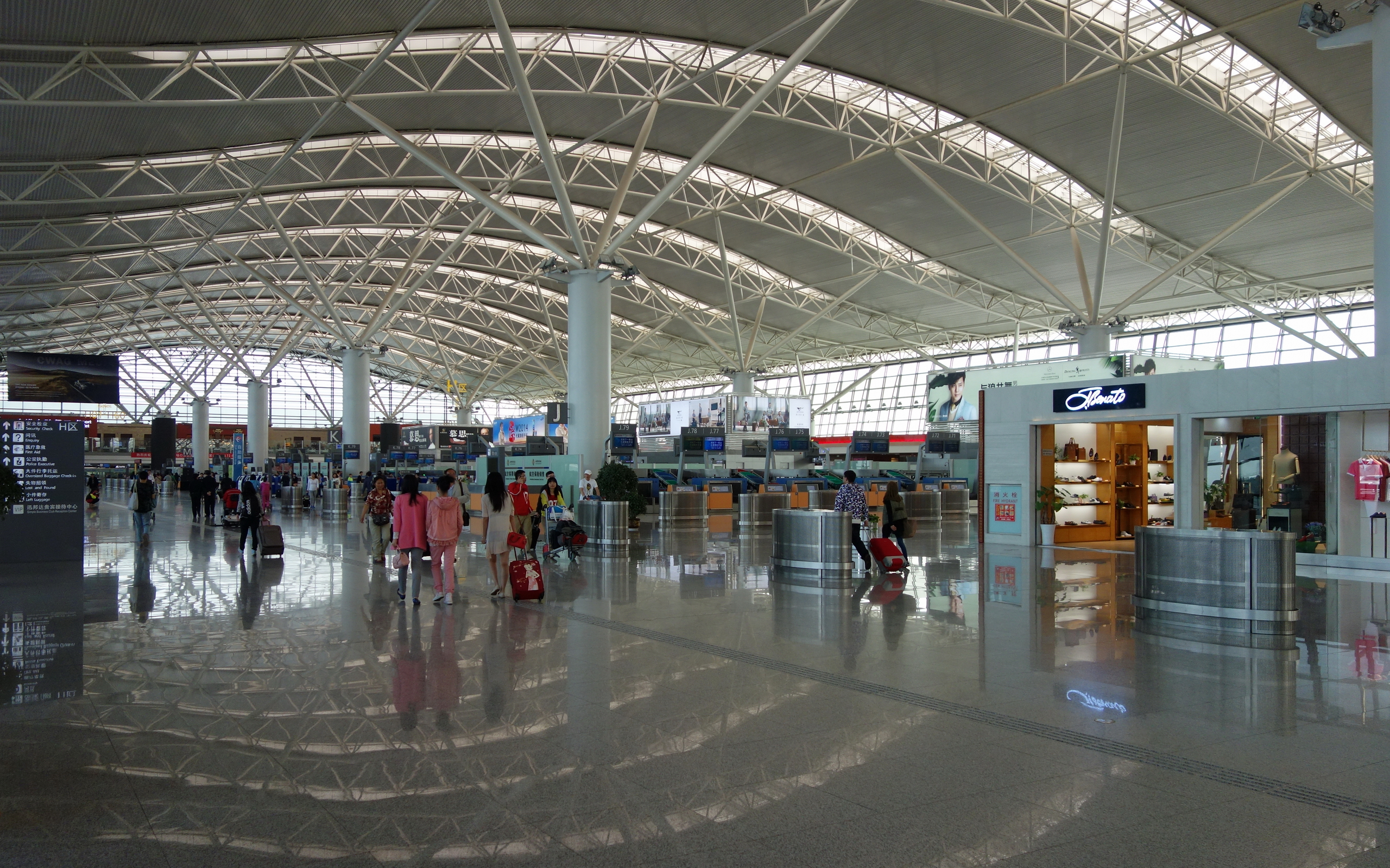 西安咸阳国际机场3号航站楼出发大厅